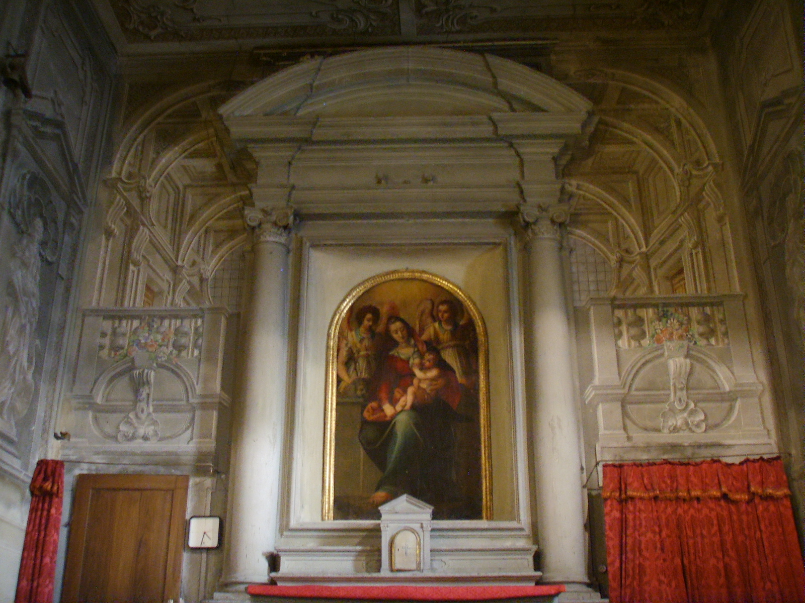 San pier gattolino, oratorio ss sacramento